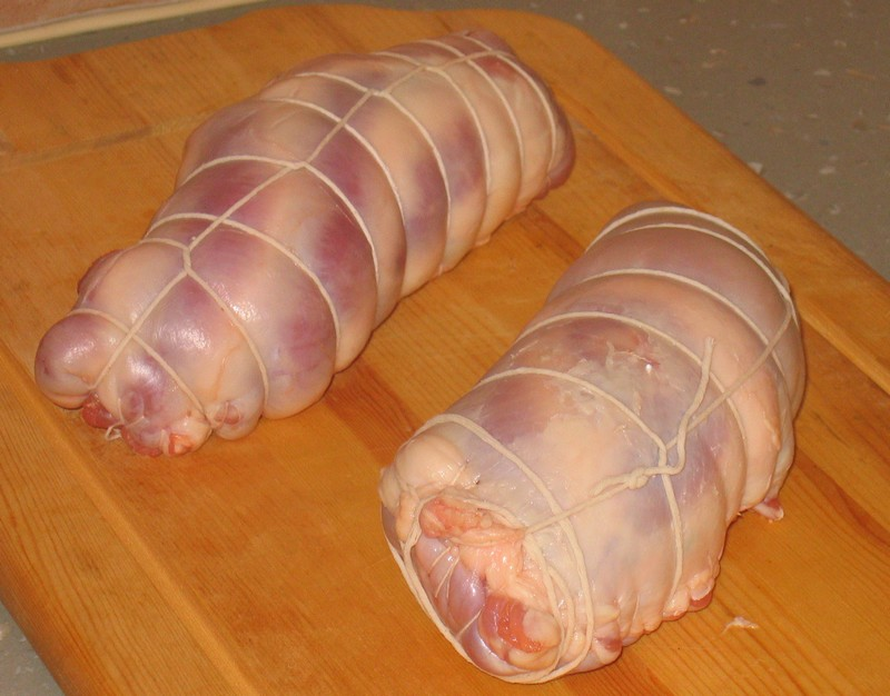 Rullepølse (rull) av lam.